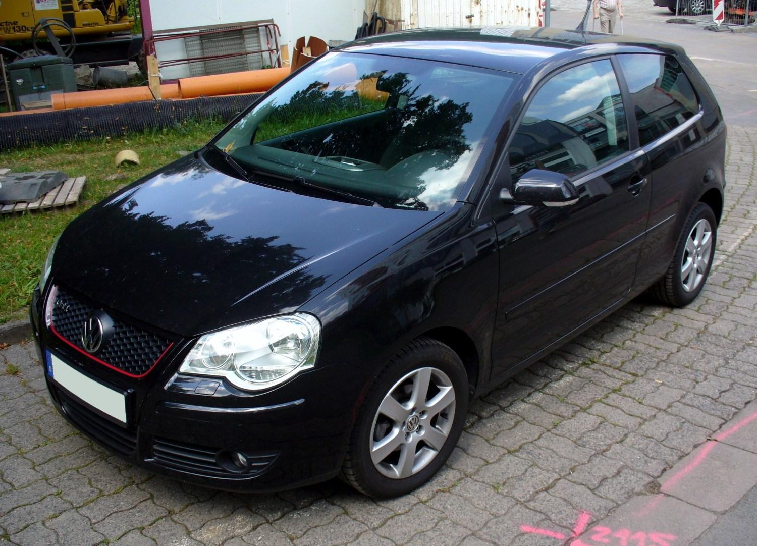 VW Polo